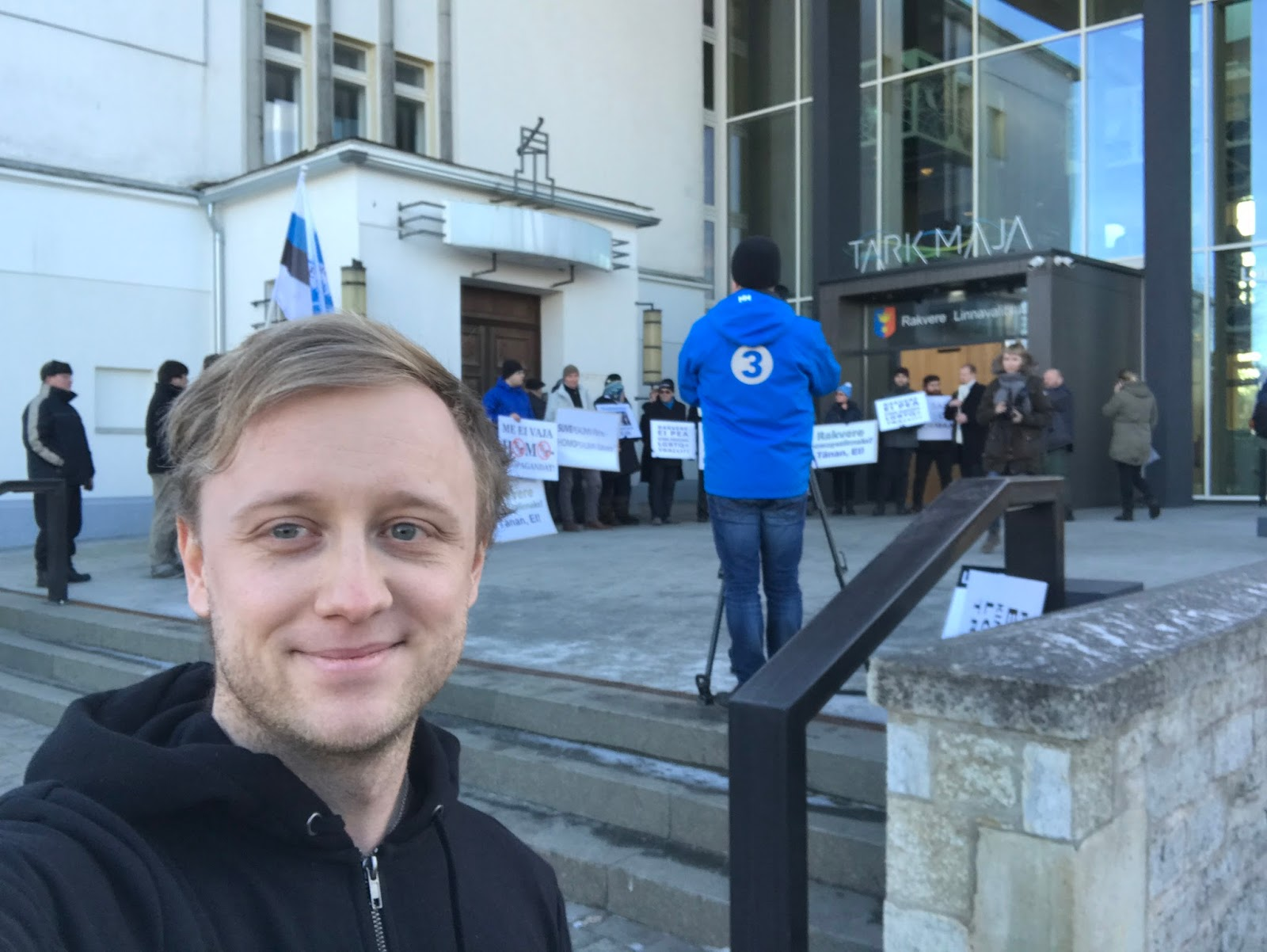 Festhearti peakorraldaja Keio Soomelt 15. veebruaril 2017 Rakvere linnavalitsuse ees toimunud ja EKRE korraldatud festivali vastase meeleavalduse taustal.